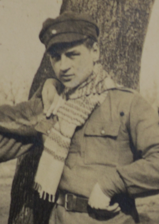 Zdjęcie z wojska, st. strz. pchor. Jana Barniak ps. "Wrzos", żołnierza OP-11 rok 1932/33